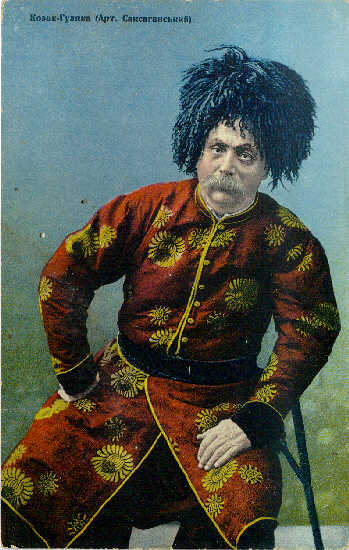 Актер Саксаганский в роли Казака-гуляки. 1905